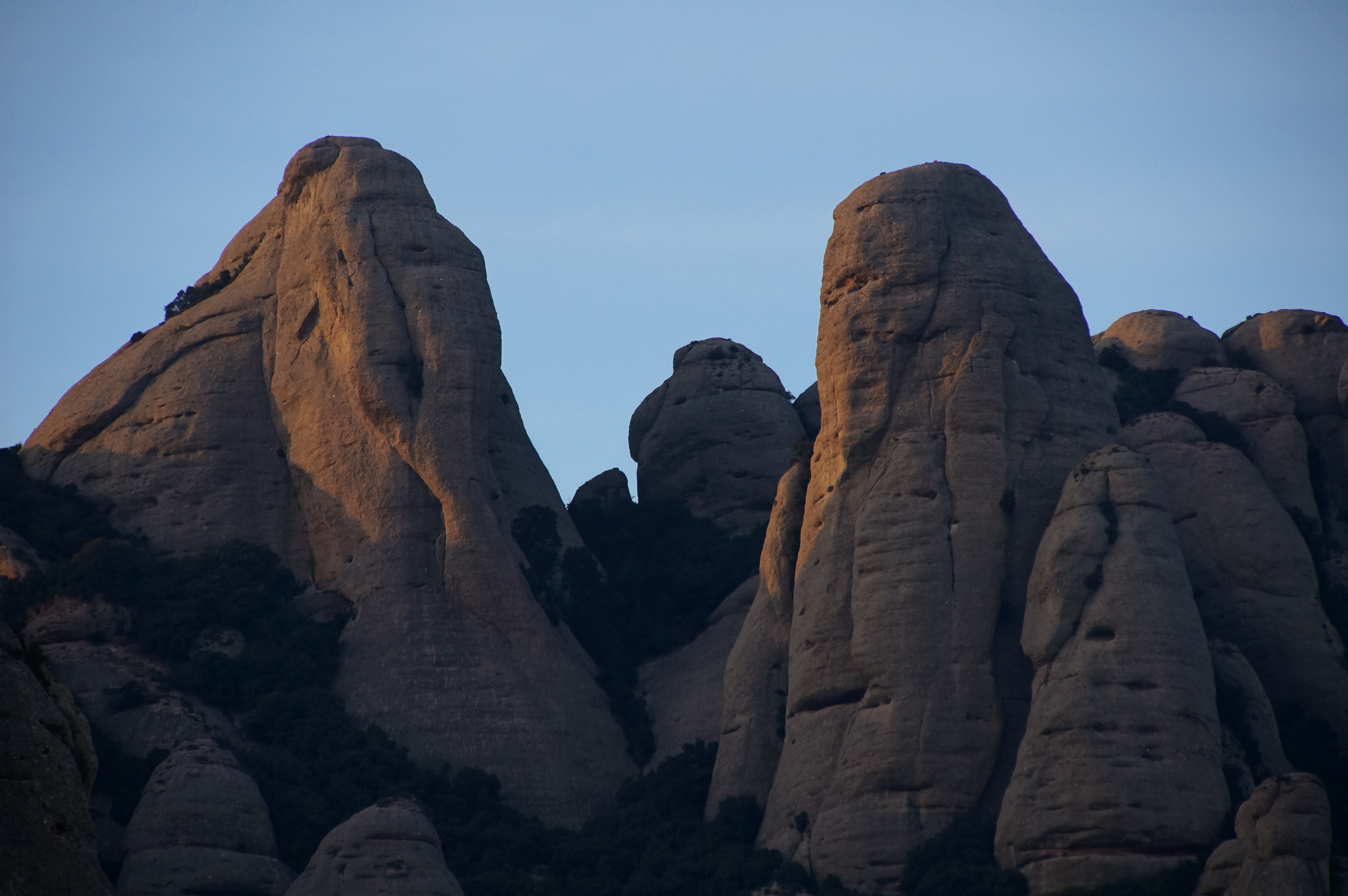 Montserrat This is a a photo of a geologic site or geotope in Catalonia, Spain, with id: IEIGC-224